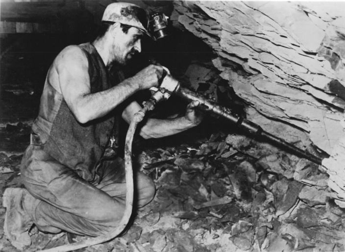 Bergarbeiter bohrend Zentralbild Paalzow 4.1.1952 Die Kumpels vom Mansfeld Kombinat "Wilhelm Pieck."Der Häuer Otto Lemke von der Brigade "Heinrich Schäfer" des Otto Brosowski-Schachtes arbeitet mit Preßlufthammer vor Ort.Die Brigade verpflichtete sich, 3% ihres Lohnes für den Aufbau Berlins zu zeichnen.